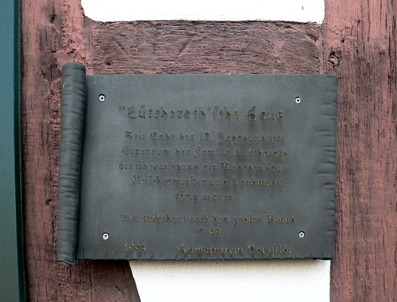 Vorsfelde, Kattenstrasse 1, Tafel